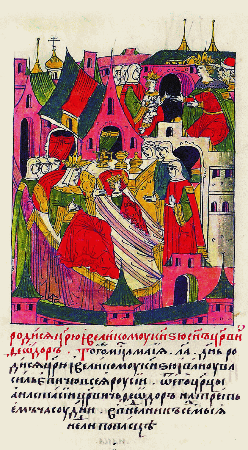 Лицевой летописный свод "Родился сын царевич Федор у царя и великого князя. В том же месяце мае в 31 день родился у царя и великого князя Ивана Васильевича всея Руси от его царицы Анастасии (сын) царевич Федор в третьем часу дня, в понедельник седьмой недели по Пасхе".